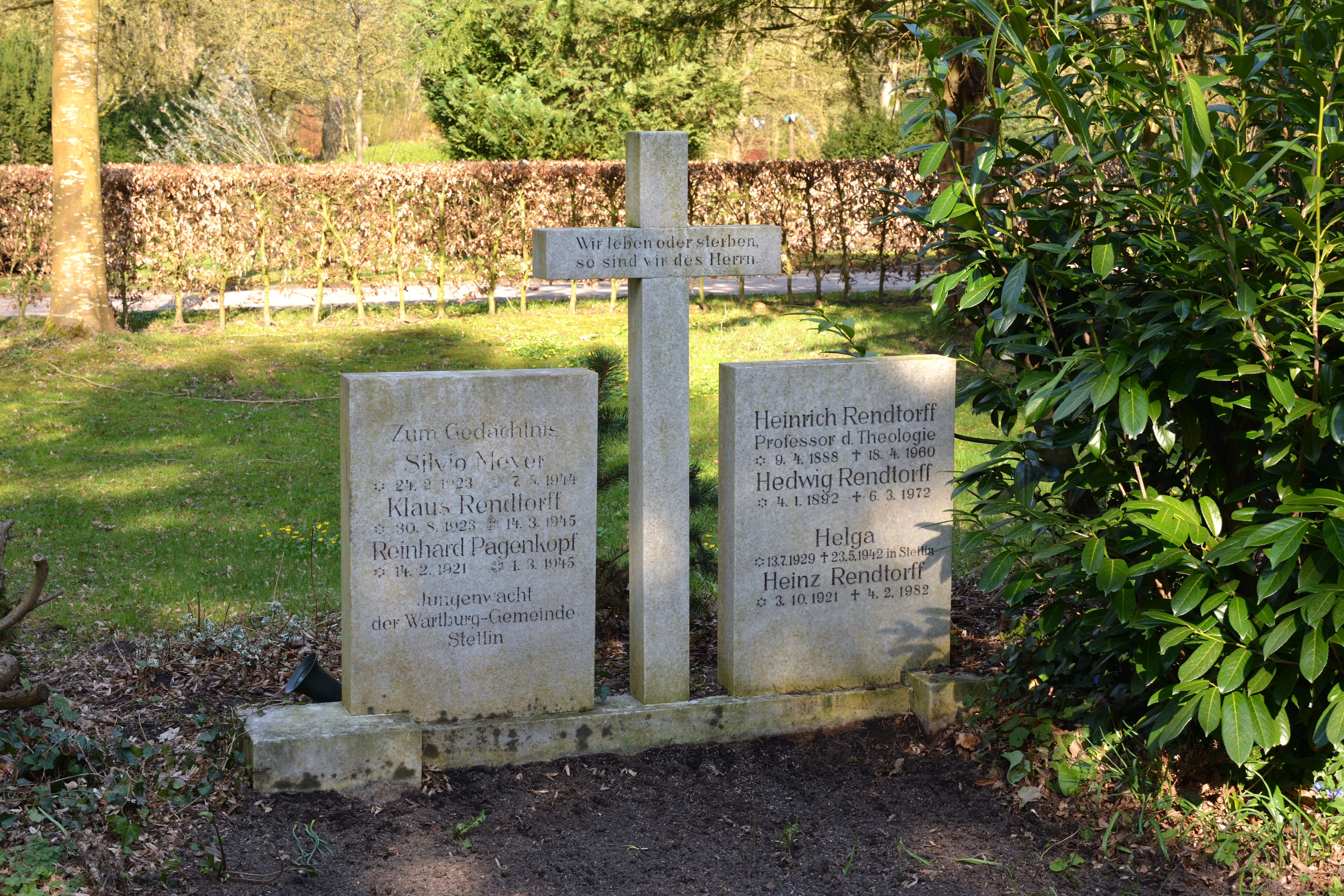 Impressionen vom Nordfriedhof in Kiel: Grab von Heinrich Rendtorff